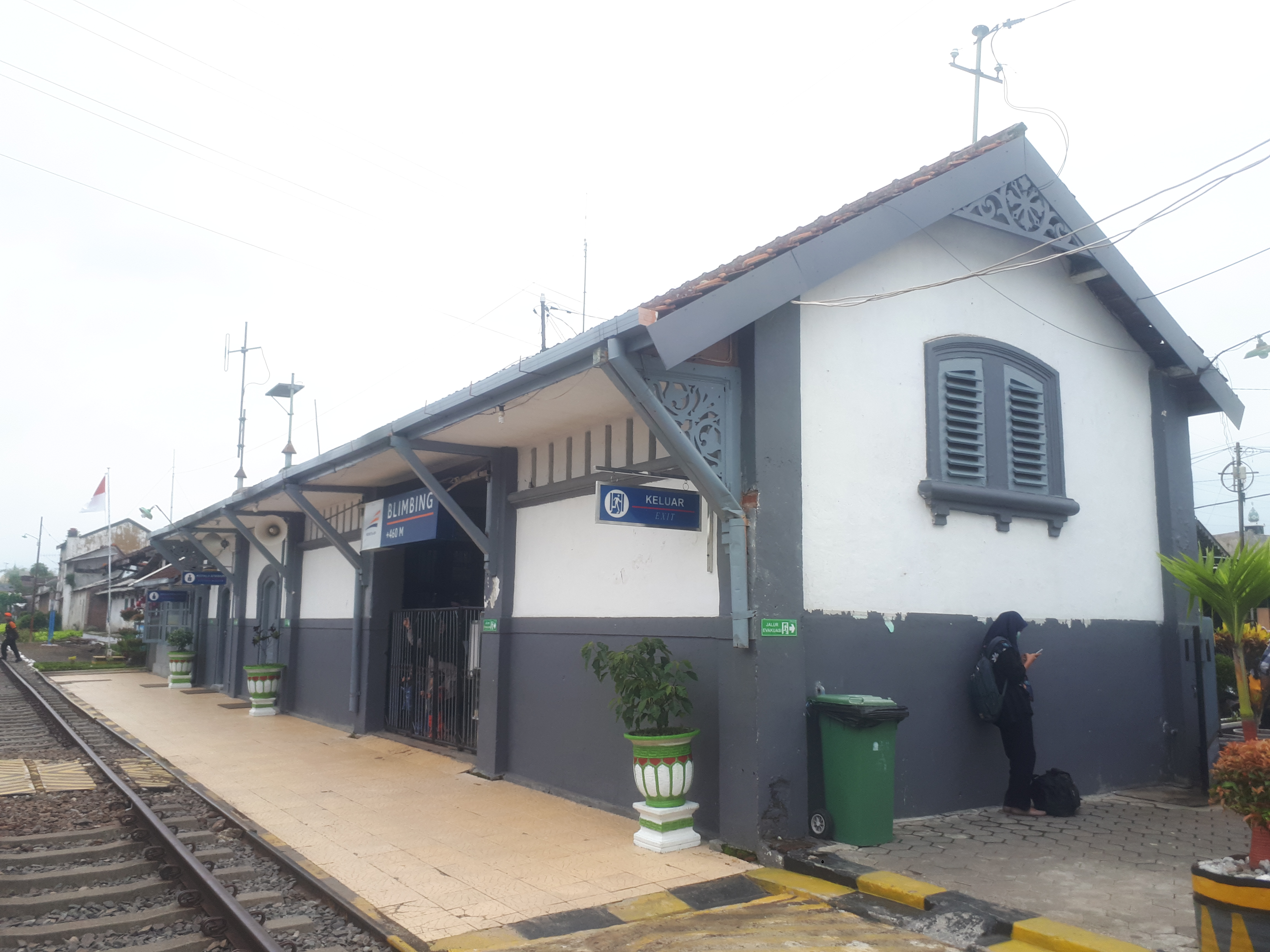 Stasiun Blimbing pada tahun 2020